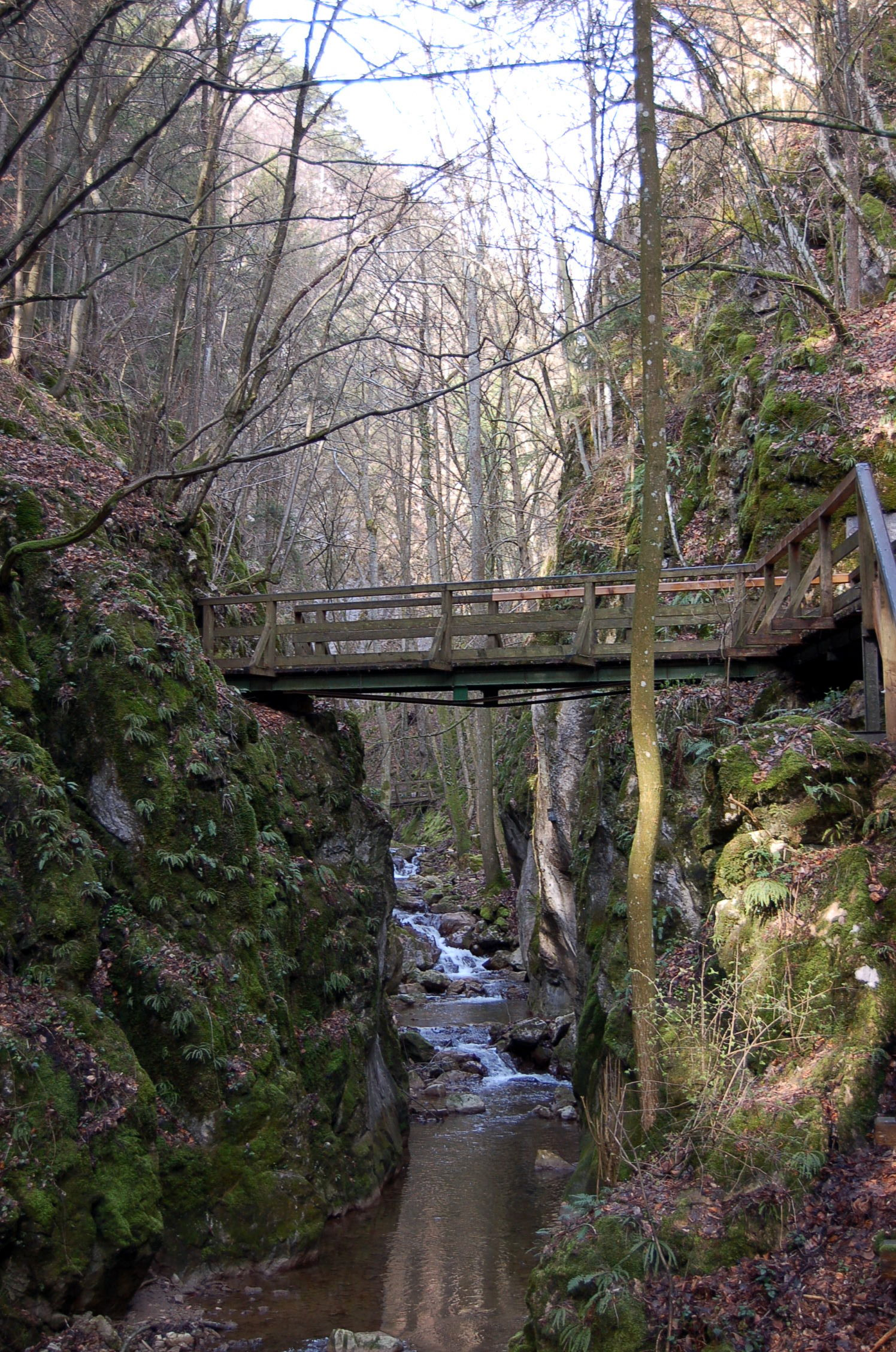 Johannesbachklamm, Würflach, Niederösterreich/Lower Austria